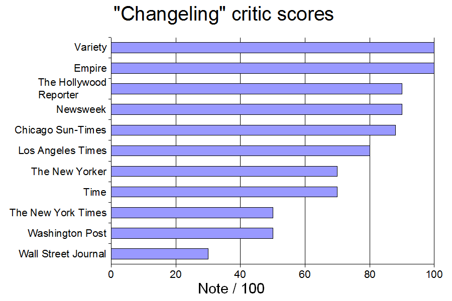 Tableau des notes de critiques attribuées à L'Echange selon